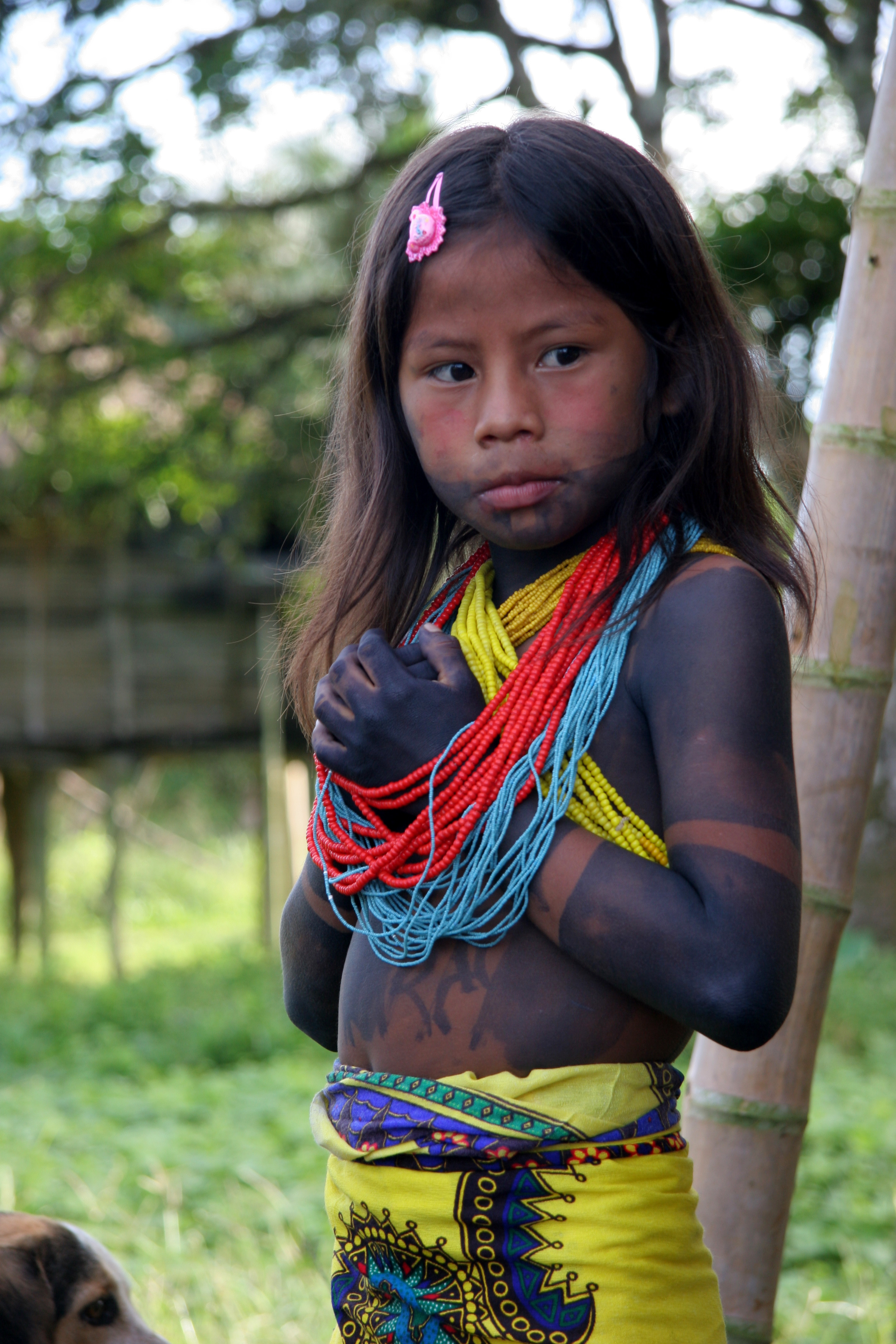 Panama, Darien, fillette Embera habillée pour la danse